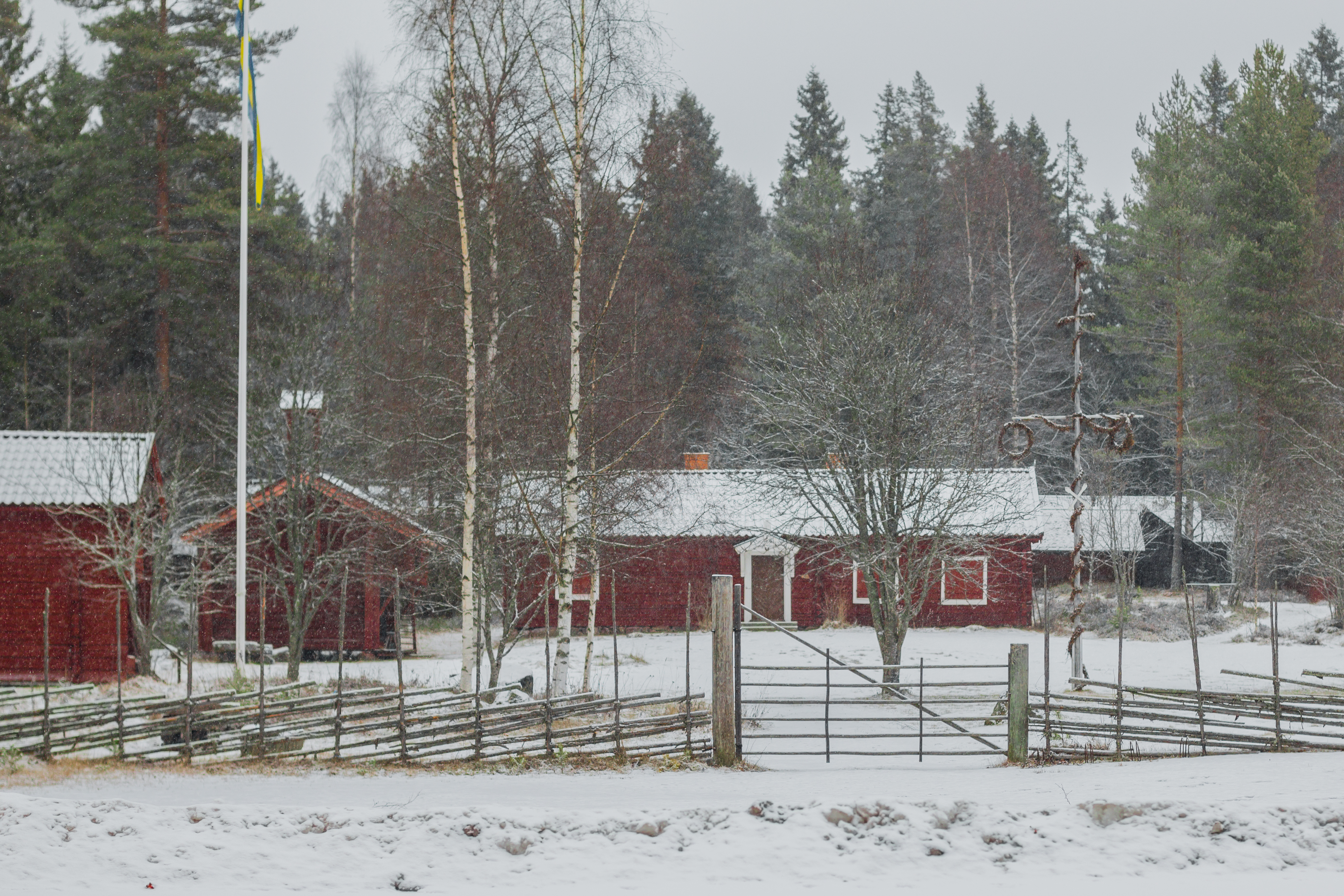 Garpenbergs gammelgård. Hedemora, Garpenberg